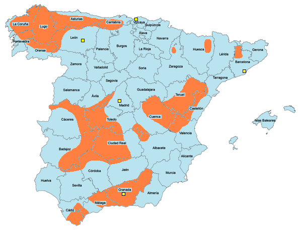 Ampliación de la información recogida en Imagen:Mapa maquis.png